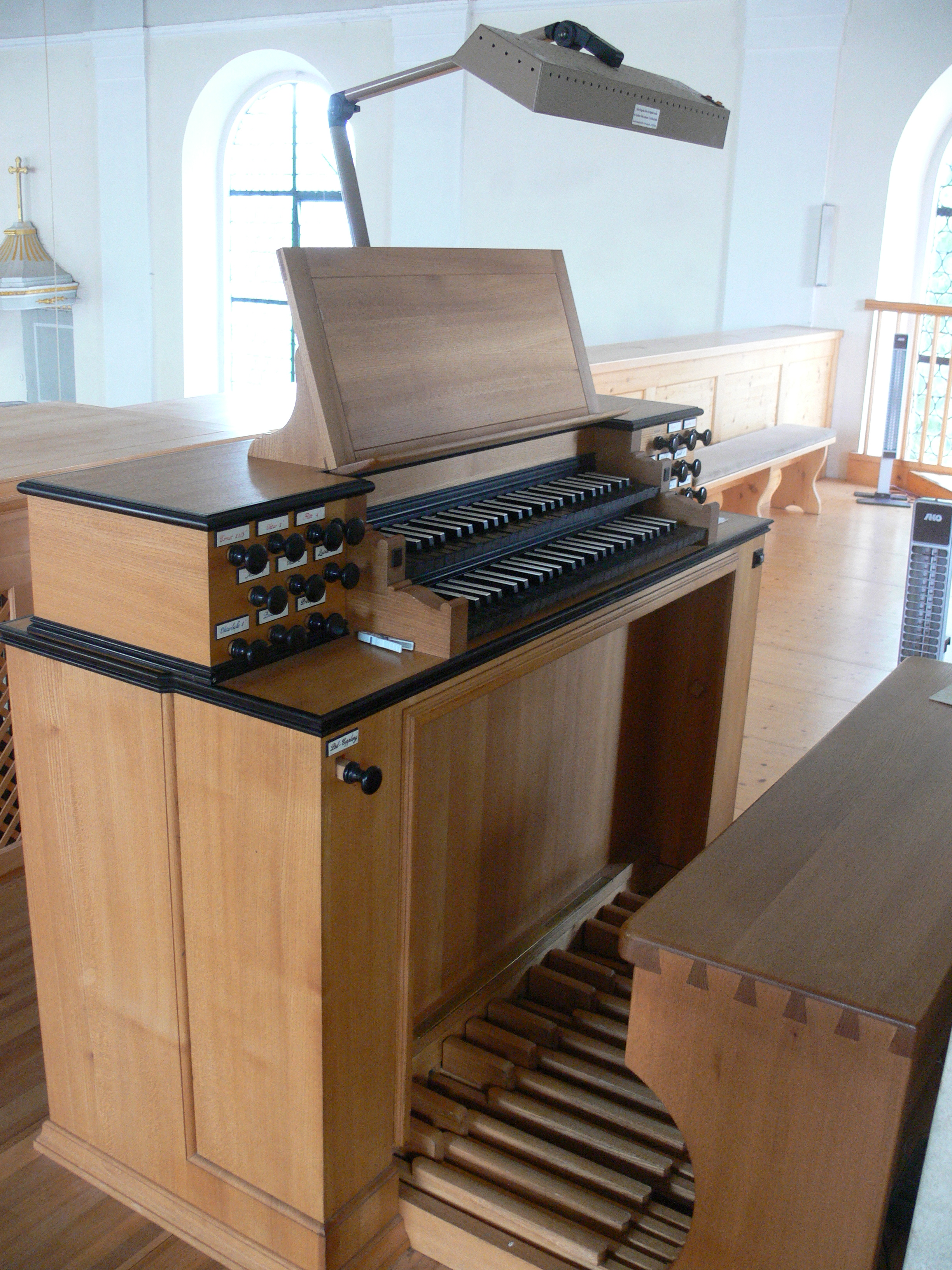 Treherz, Gemeinde Aitrach, Landkreis Ravensburg Pfarrkirche St. Johann Baptist Orgel, Spieltisch